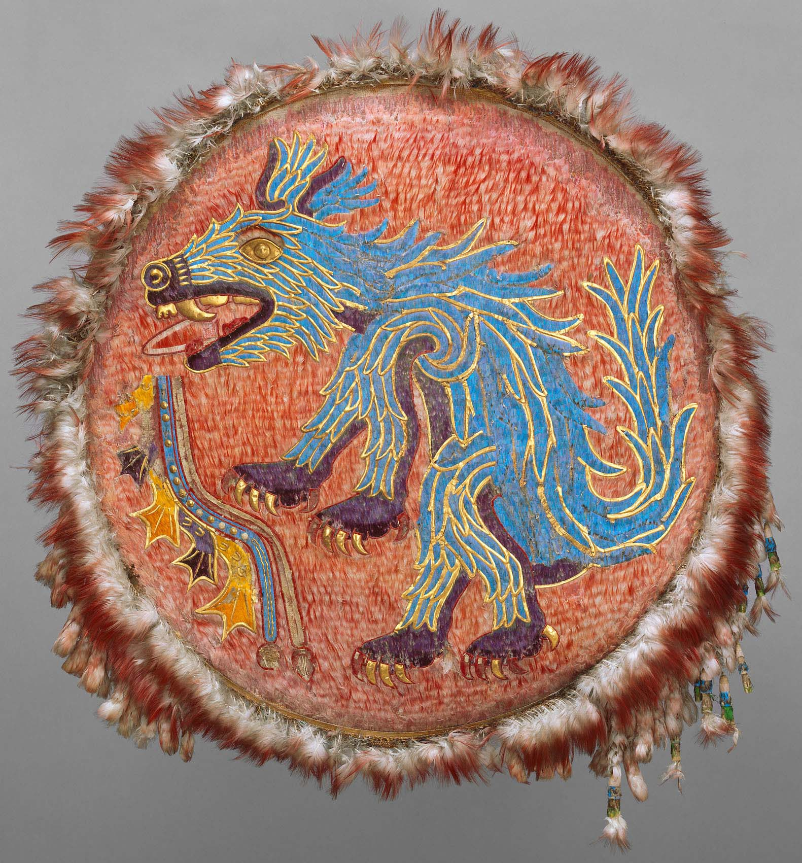 Escudo perteneciente al emperador Azteca Ahuizotl, actualmente en el Museo de Etnología de Viena, Austria.